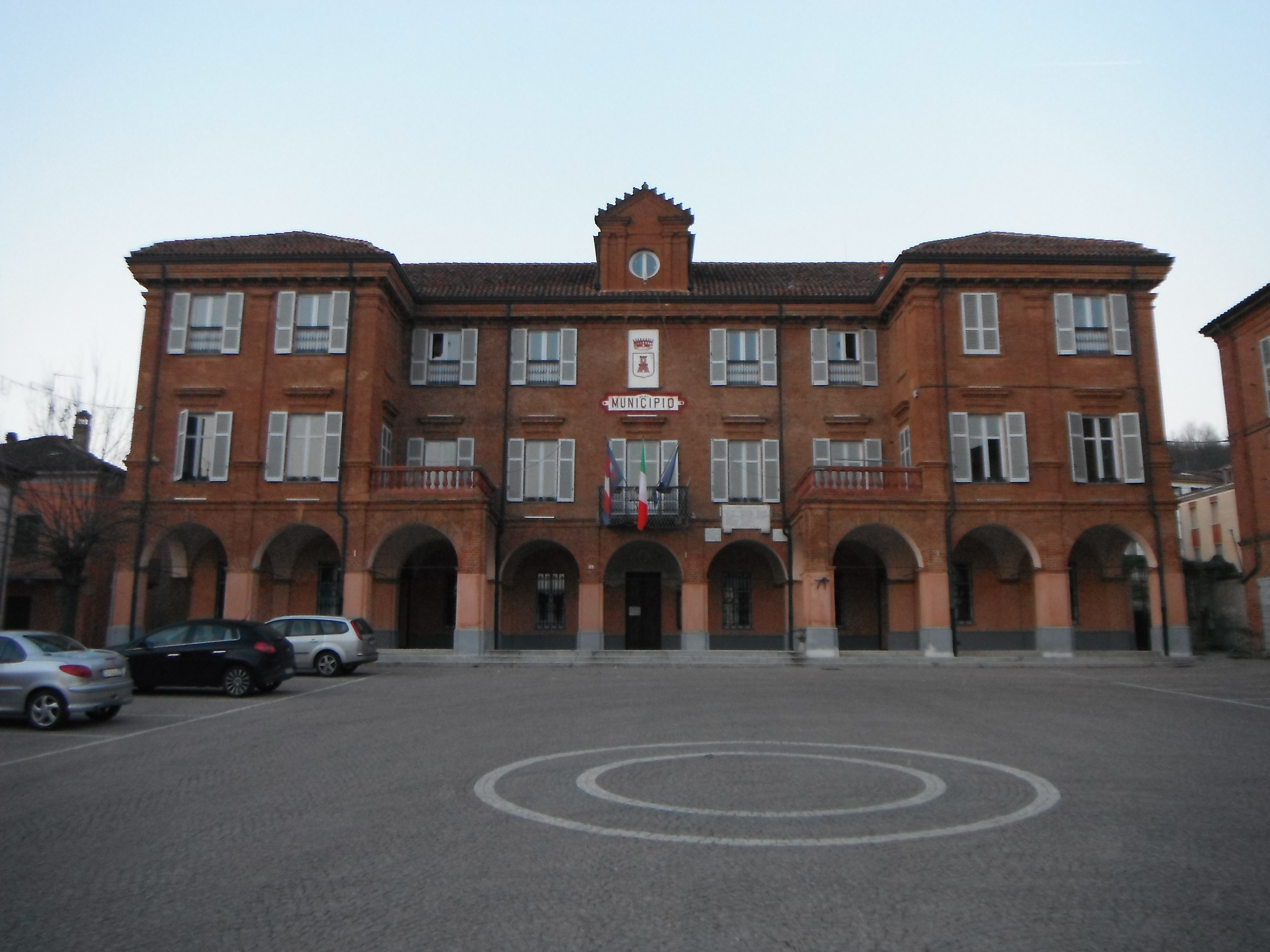 Palazzo comunale di Castelnuovo Belbo (AT), Italia.